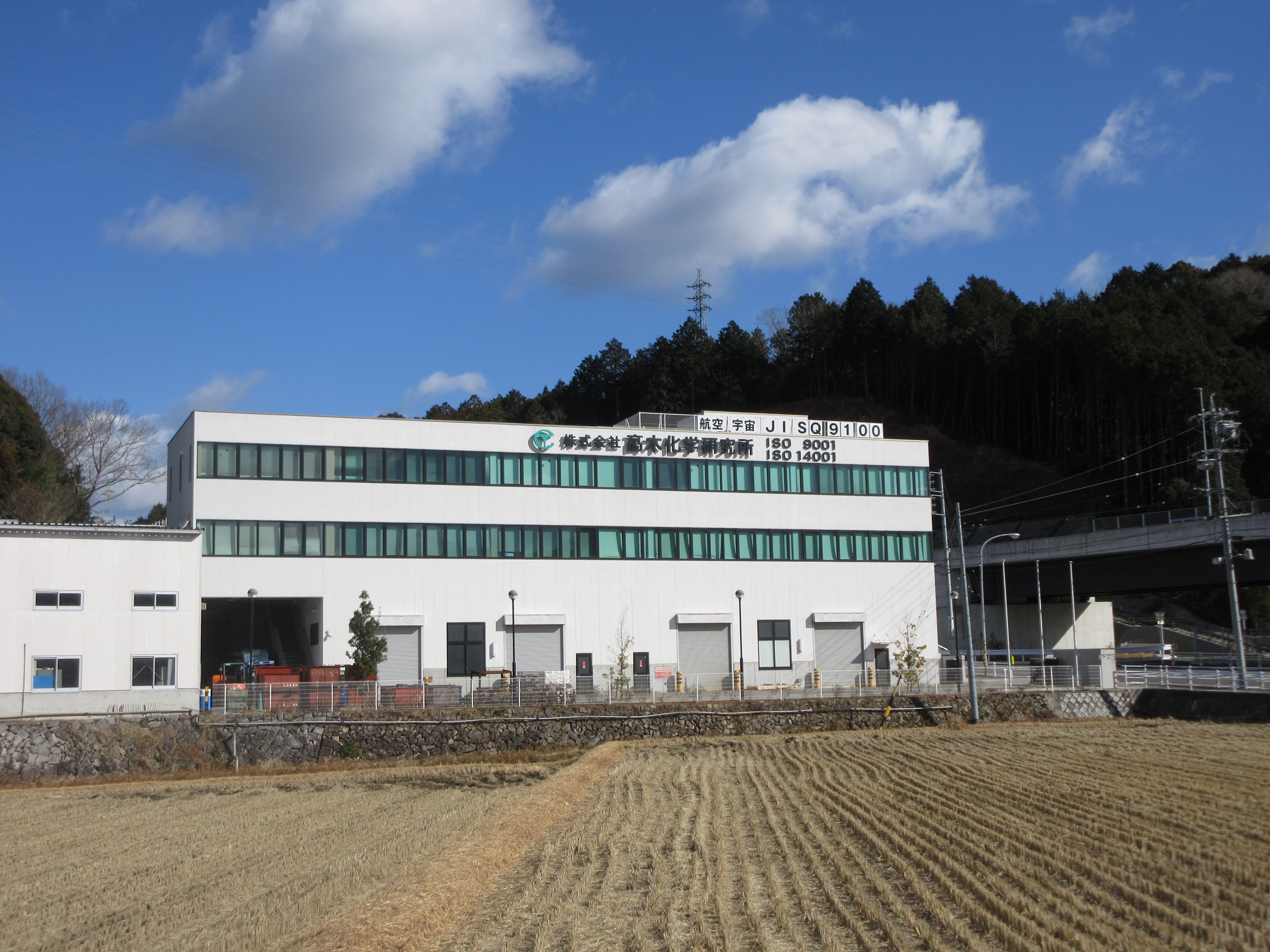 髙木化学研究所、岡崎額田バイパス